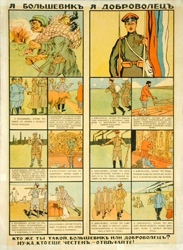 Агитационный плакат "Я-большевик, Я-доброволец", 1919 год, Белое движение, Гражданская война в России 1917-1923